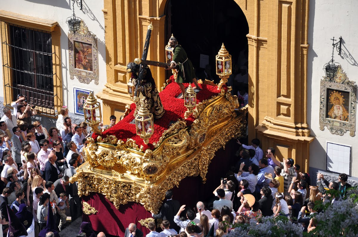 Salida de Cristo de San Roque en su paso, Sevilla